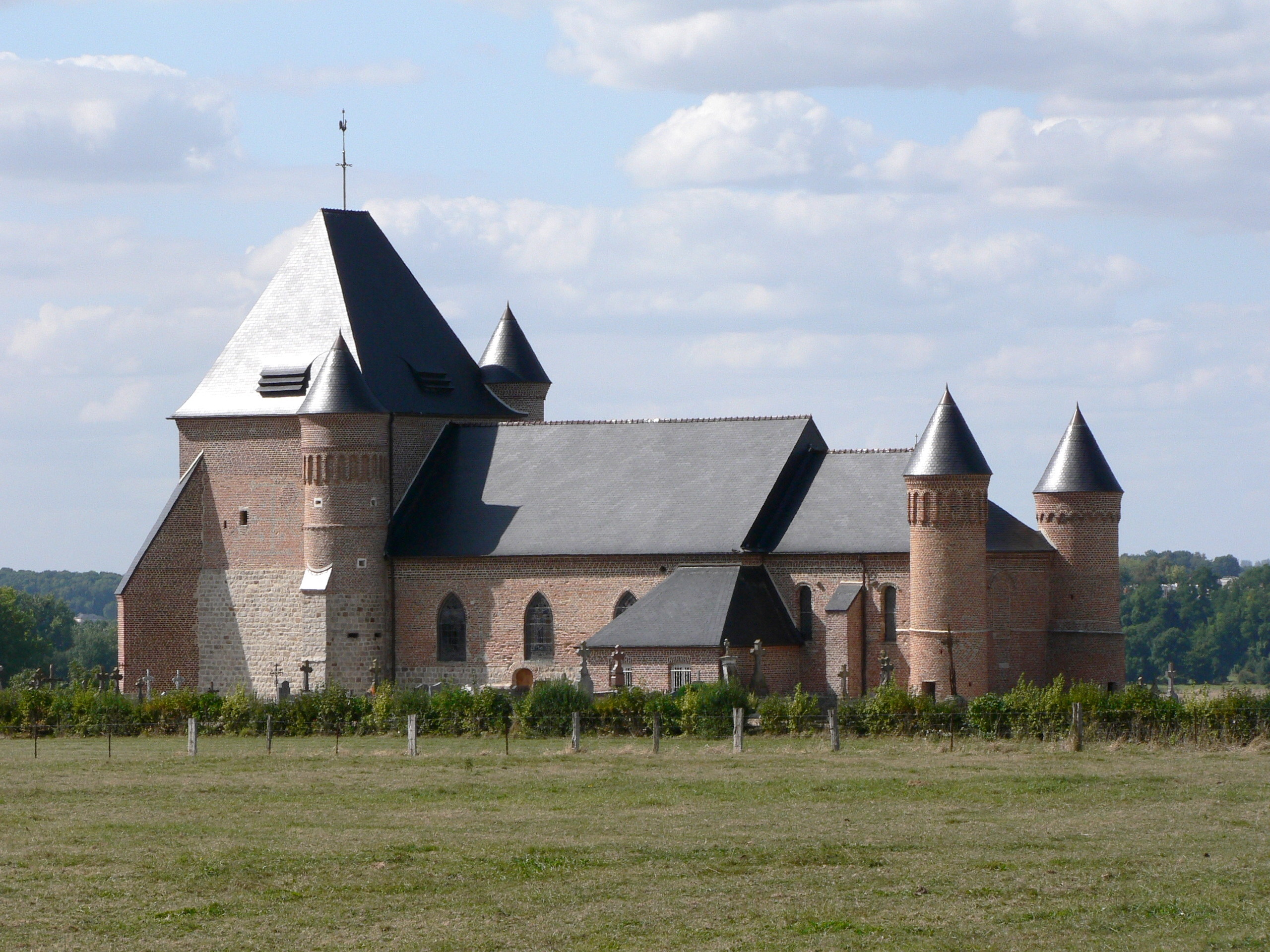 Église fortifiée de Flavigny-le-Grand-et-Beaurain, Aisne, France